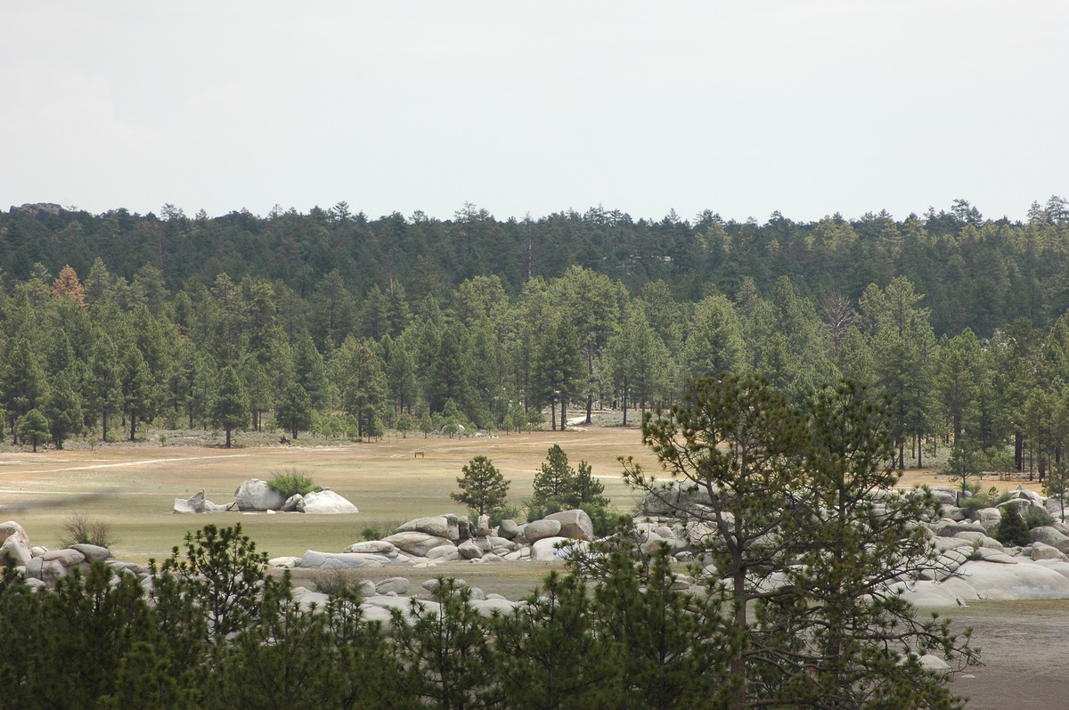 Parque nacional Constitución de 1857, Baja California/ National Park Constitución de 1857, Baja California